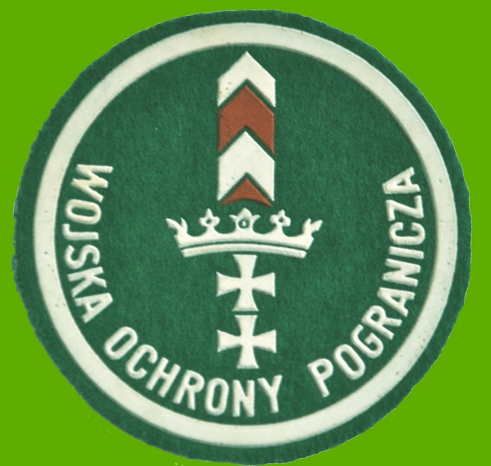 Plakietka Kaszubskiej Brygady WOP